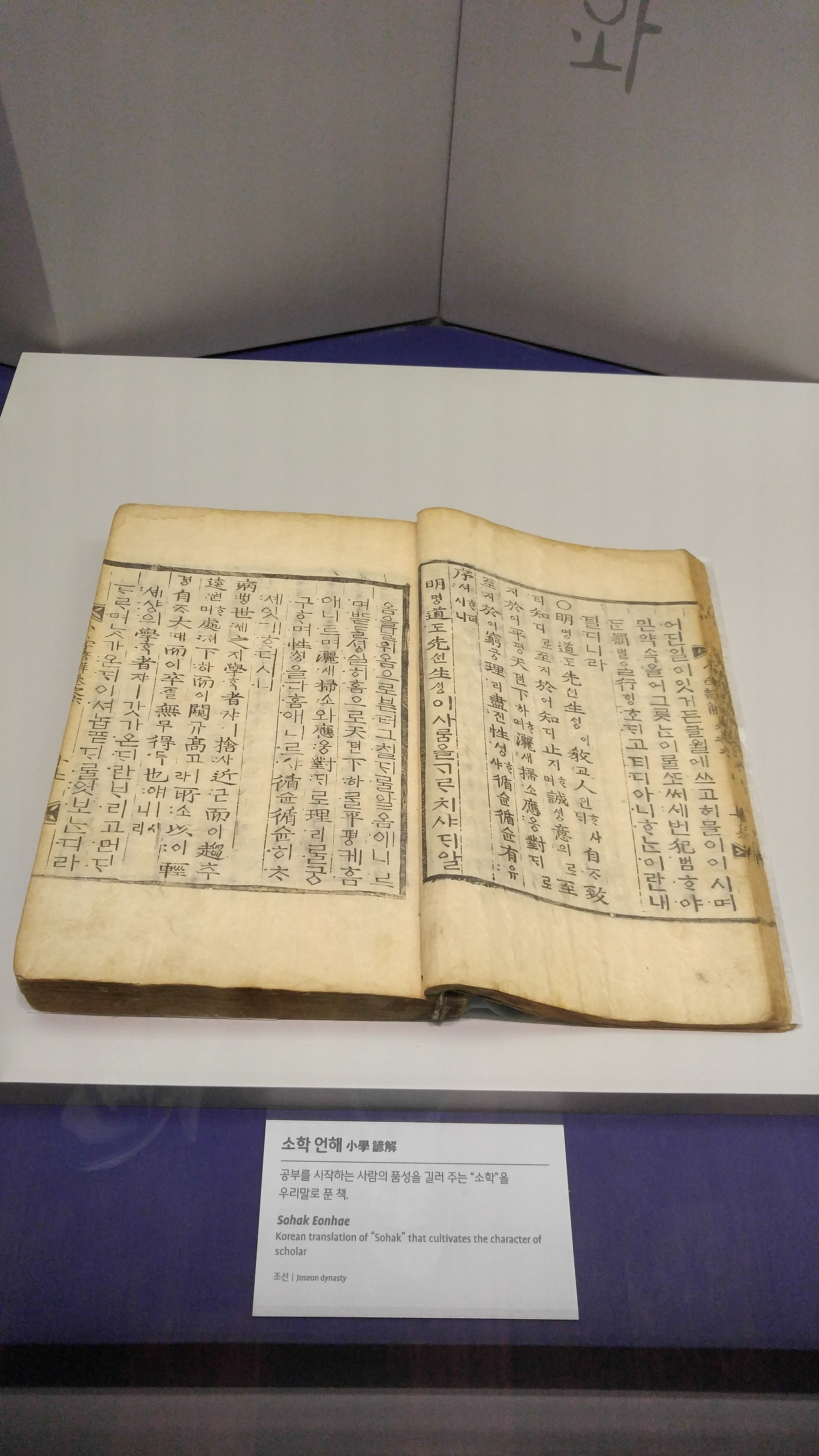 소학언해(1)